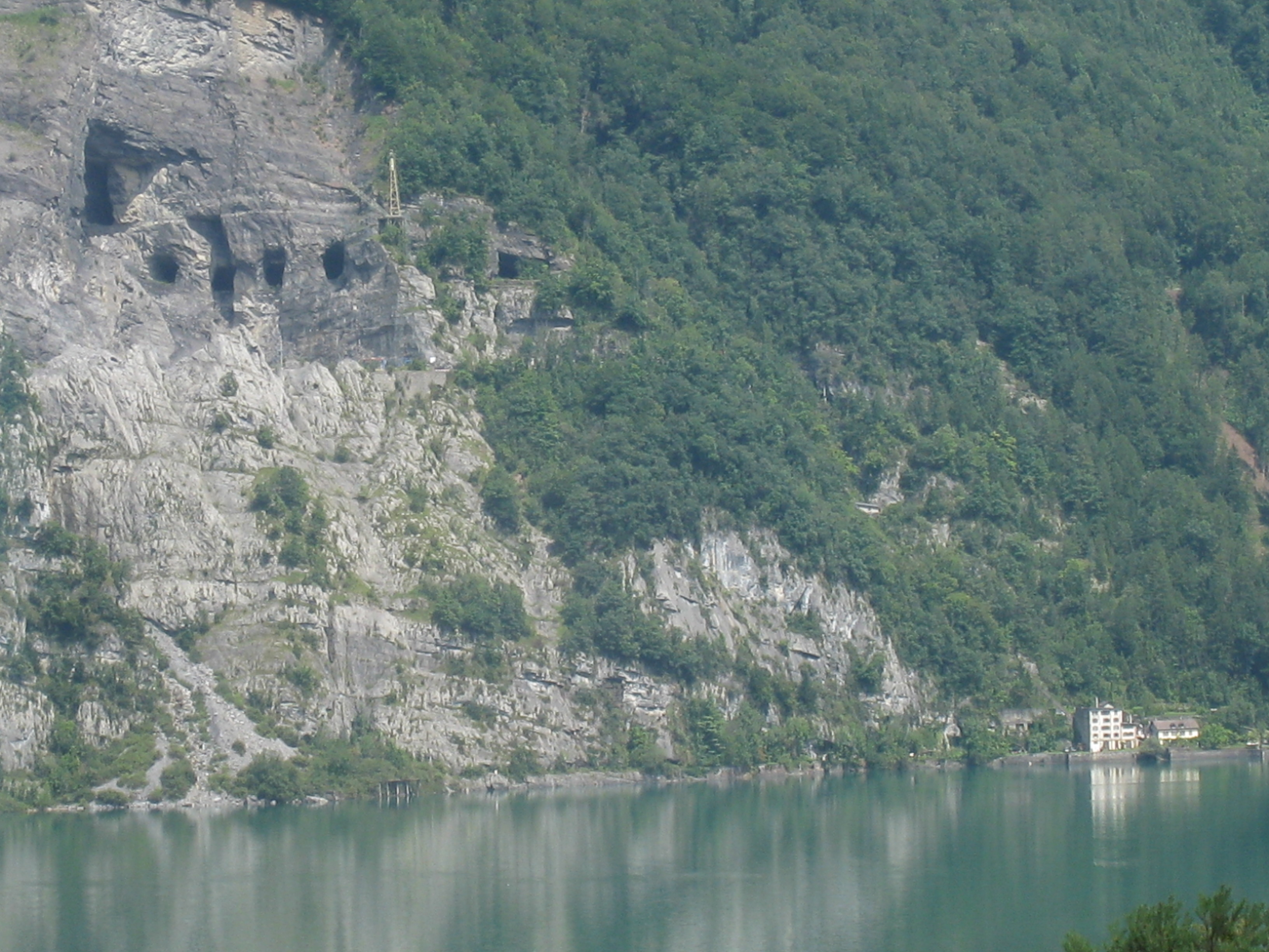 Steinbruch Lochezen fotografiert von der Raststätte Walensee-Bergsboden aus